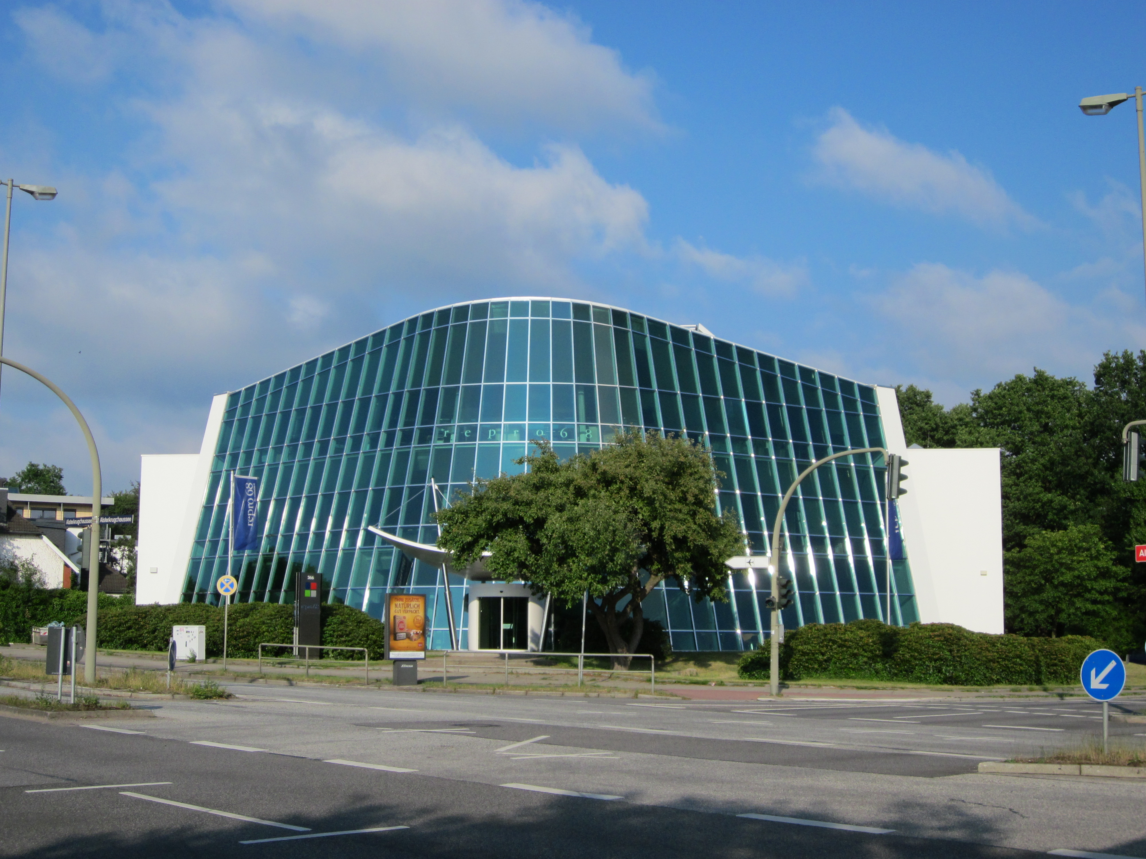 Firmenzentrale von repro 68 in der Alsterkrugchaussee 366 in Alsterdorf.